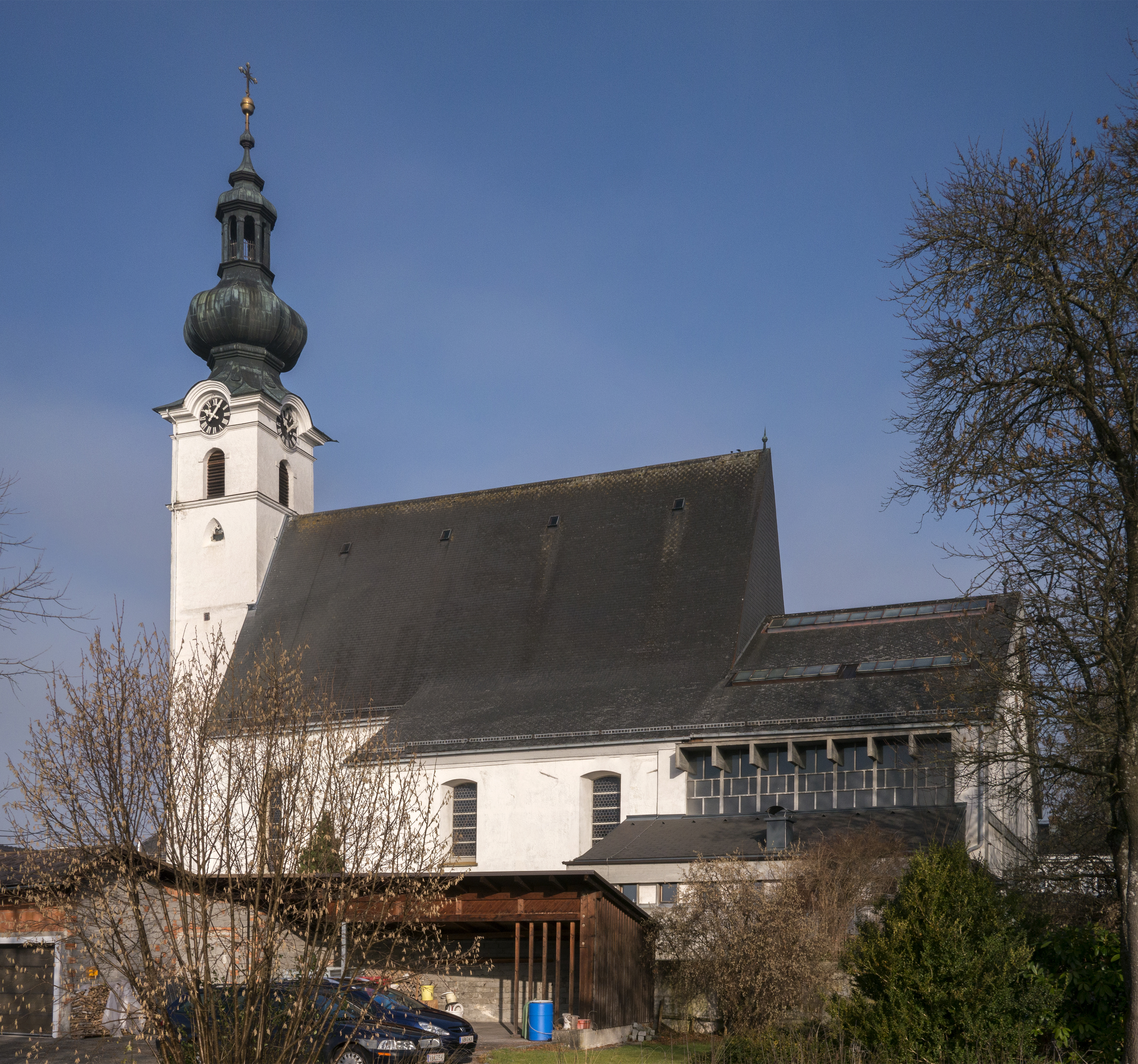 Pfarrkirche Frankenburg Nordseite